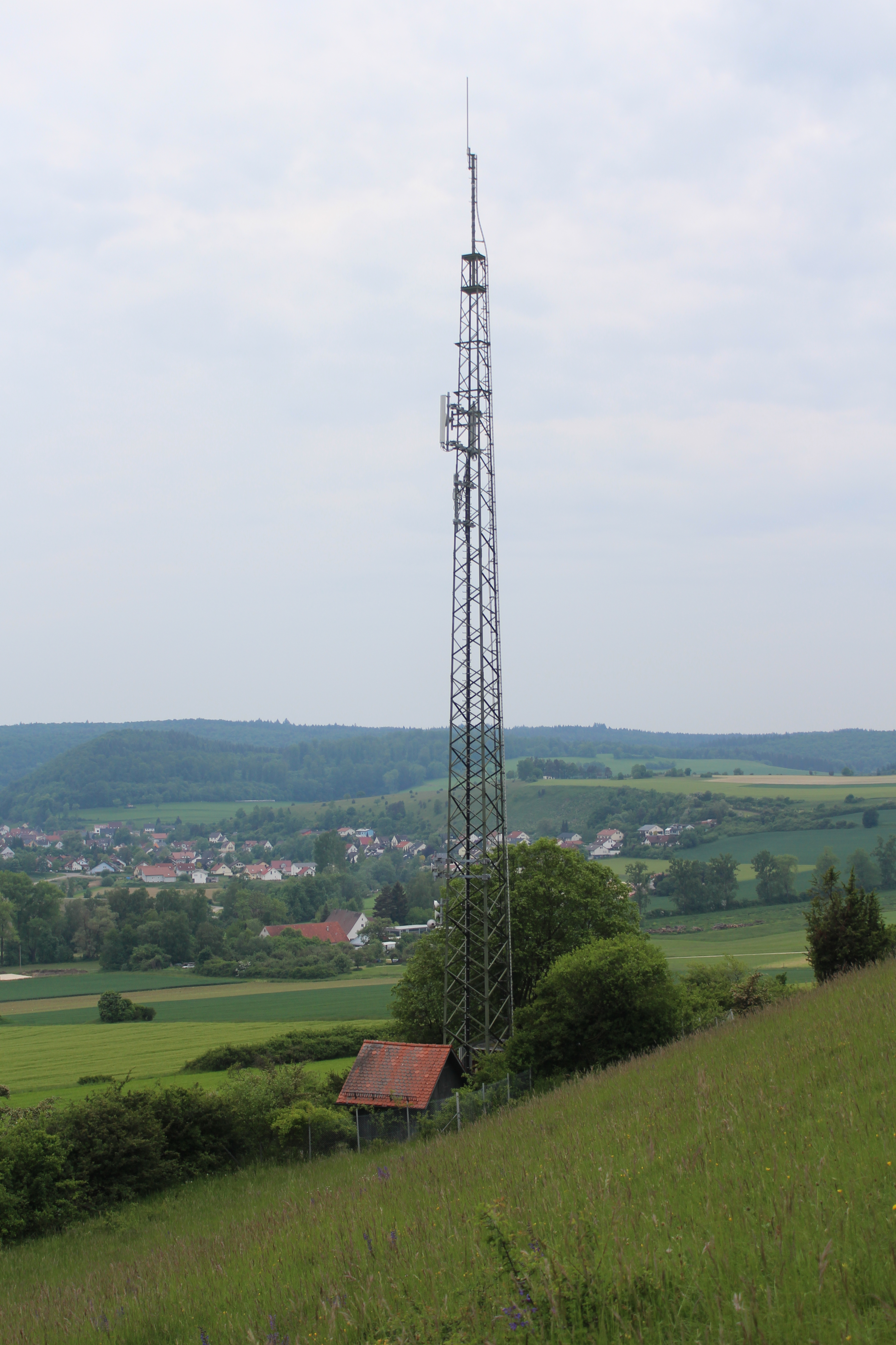 Sendeturm Karkstein